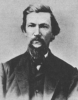 Dan DeQuille